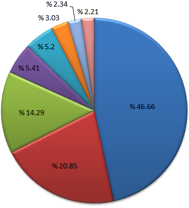 Based on File:2007 TC Milletvekili Genel Seçimleri 02.png 2007 Türkiye Cumhuriyeti Milletvekili Genel Seçimleri - Partilerin aldığı oy oranı